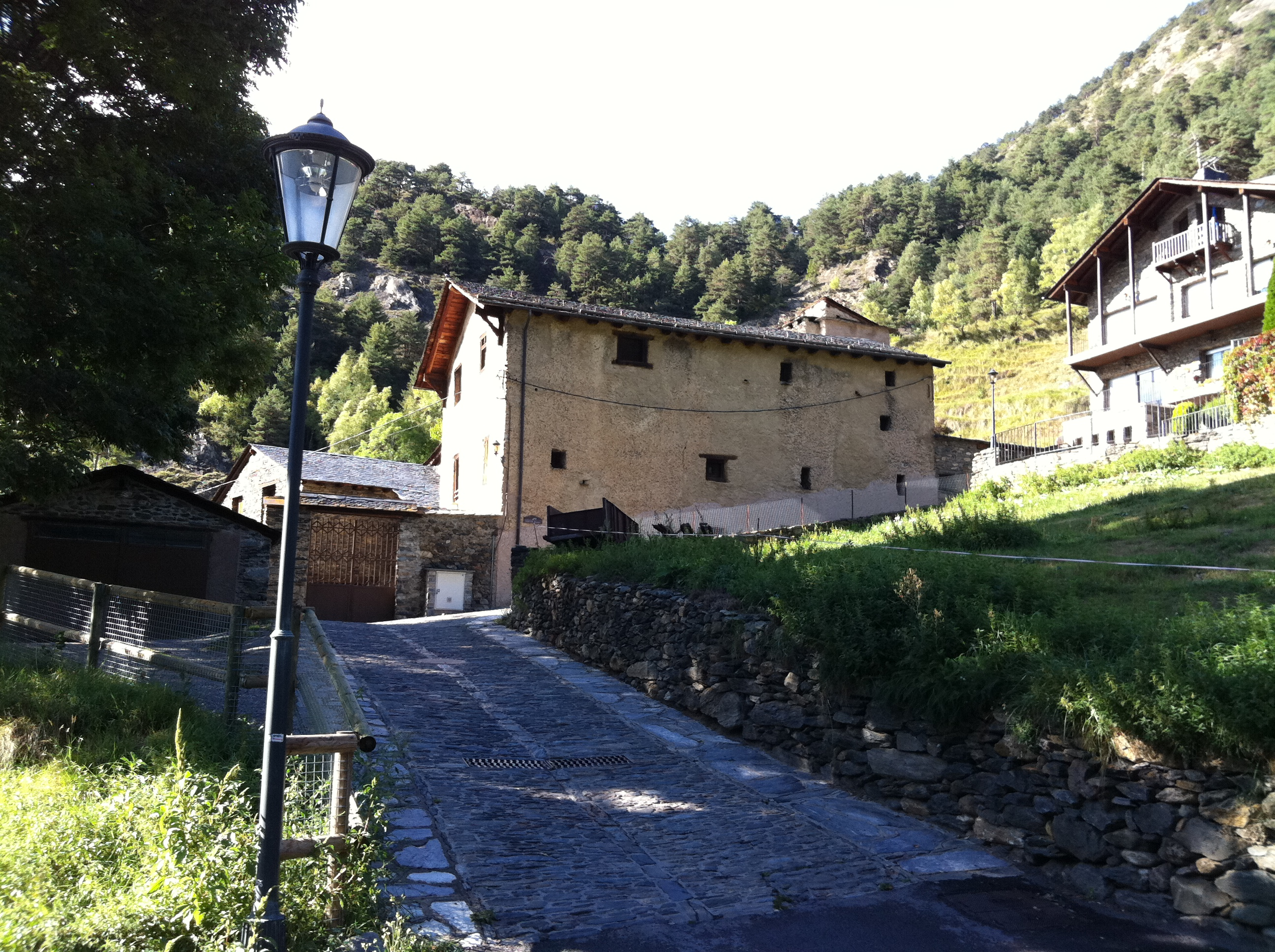 Casa Blanca (inclou dues eres i colomer)